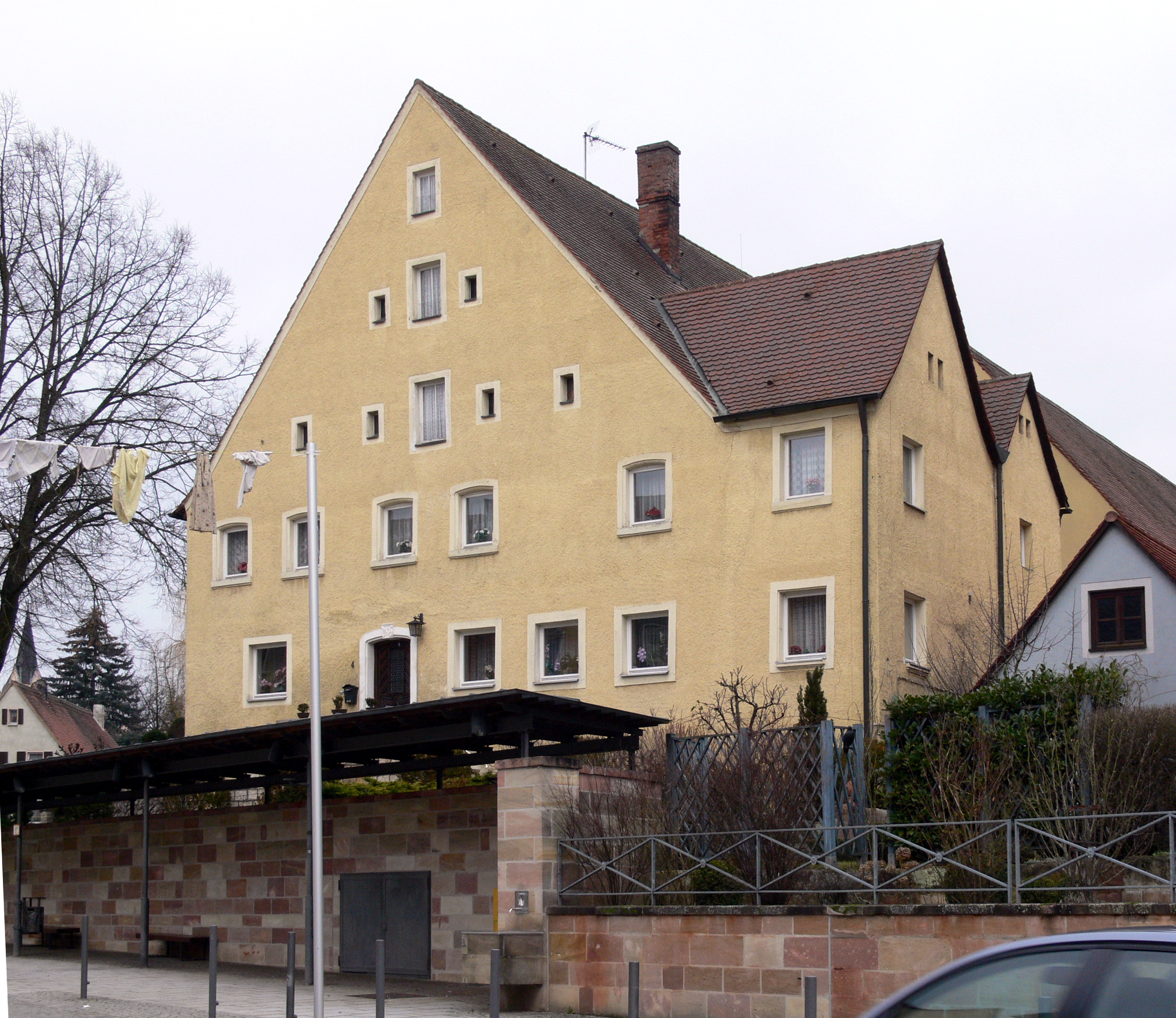 Denkmalgeschütztes ehemaliges Bauernhaus in Pleinfeld am Marktplatz 4, zweigeschossiger giebelständiger Satteldachbau, 1. Drittel 19. Jh.